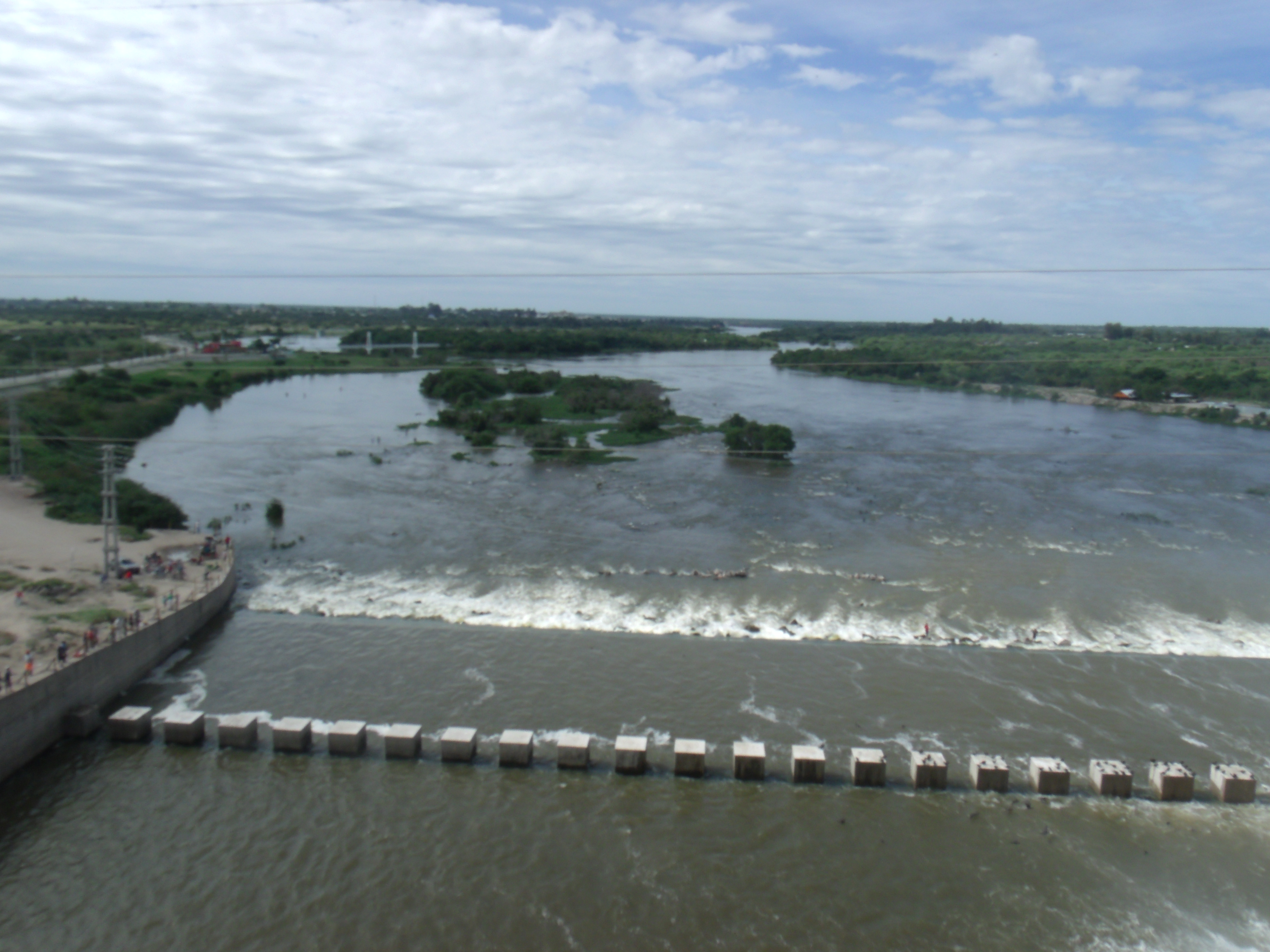 Vista del río Dulce desde el Dique Frontal